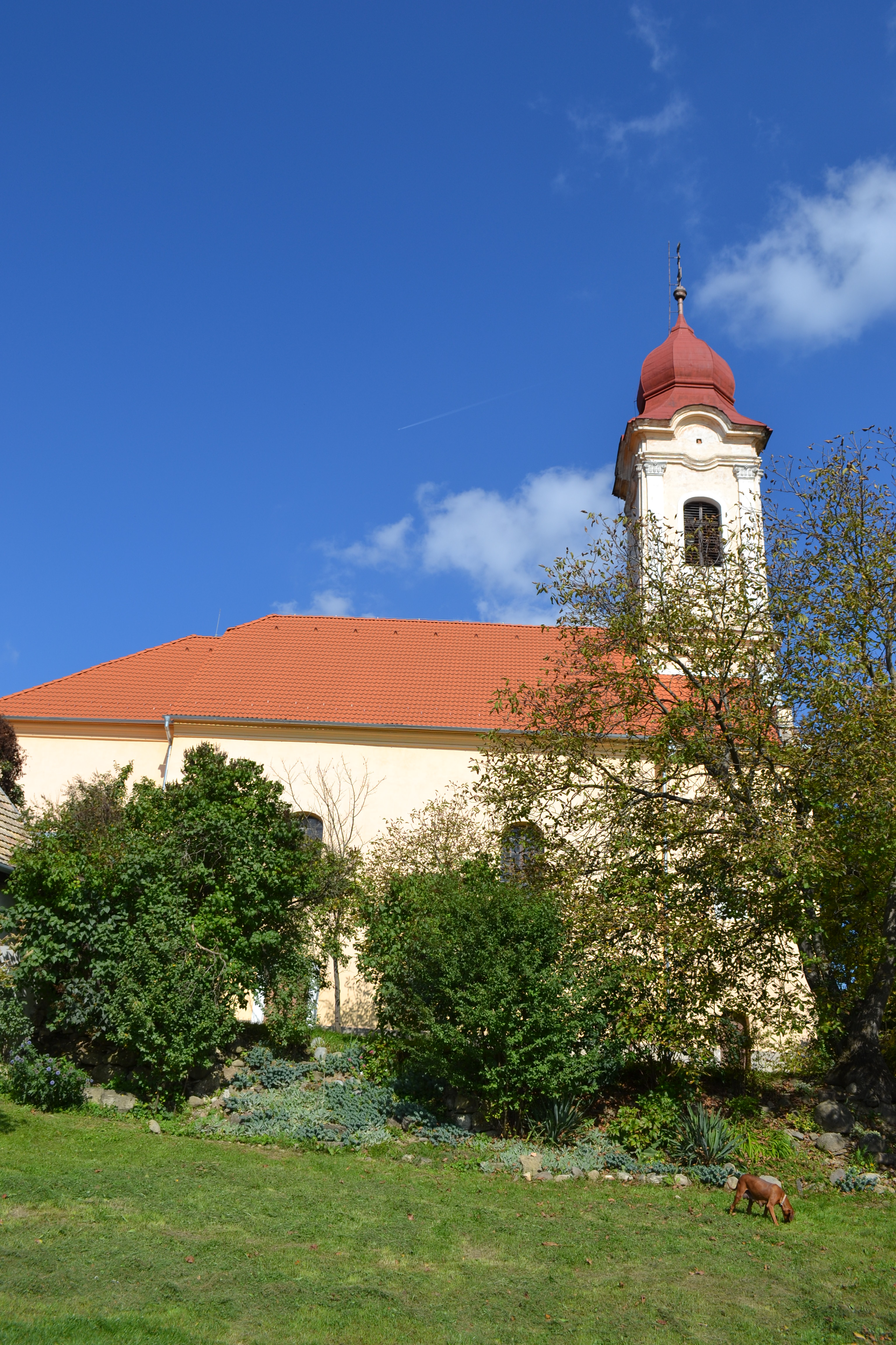 Evanjelický kostol v klasicistickom slohu z roku 1800 v Hrachove